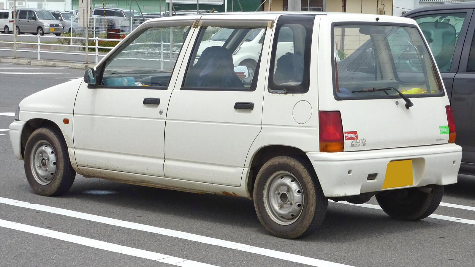 3代目スズキ・アルト（後期型リア）